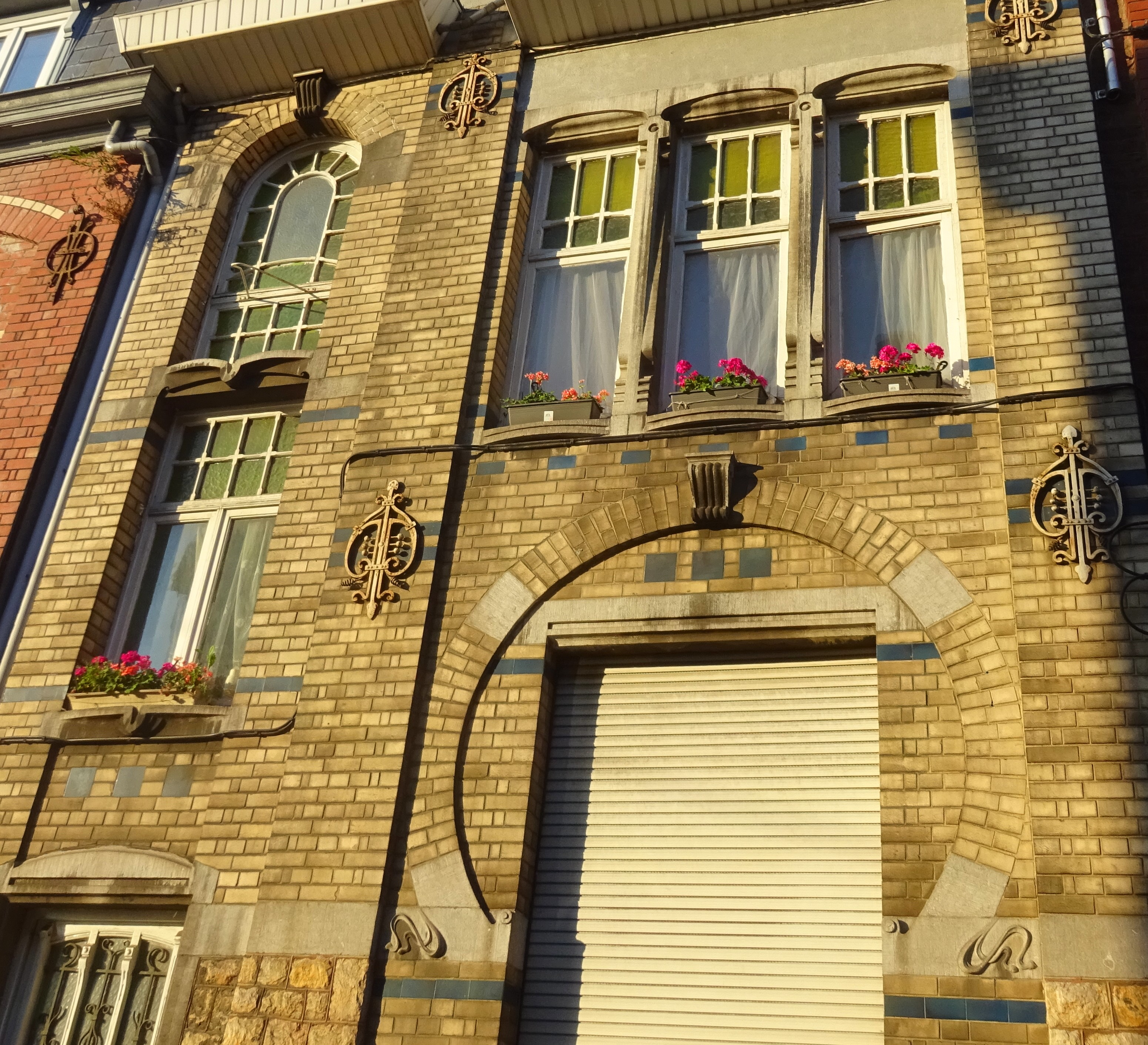 Séquence Devignée, Art nouveau, Liège